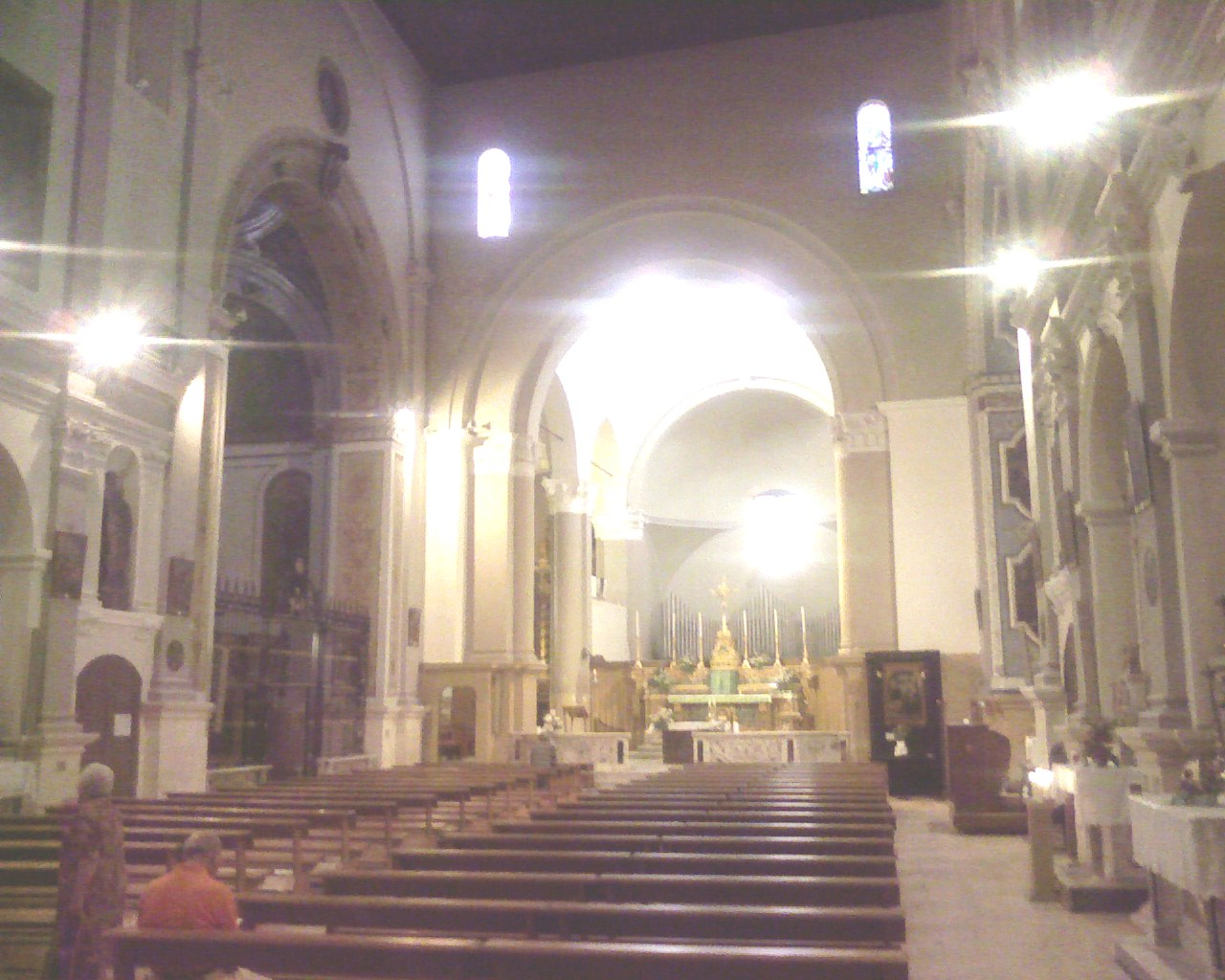 Chiesa Maria Santissima Annunziata - Modugno (Bari) - Italy